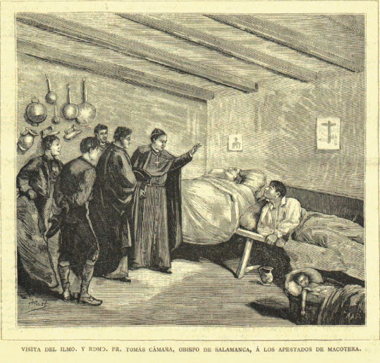 El obispo de Salamanca, padre Cámara, visita a los afectados por el cólera en 1885